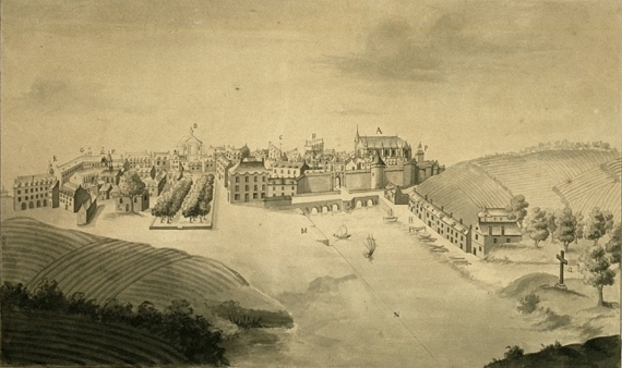 Dessin du 18ème siècle du Port de Vannes - AD Morbihan 2Fi 477.